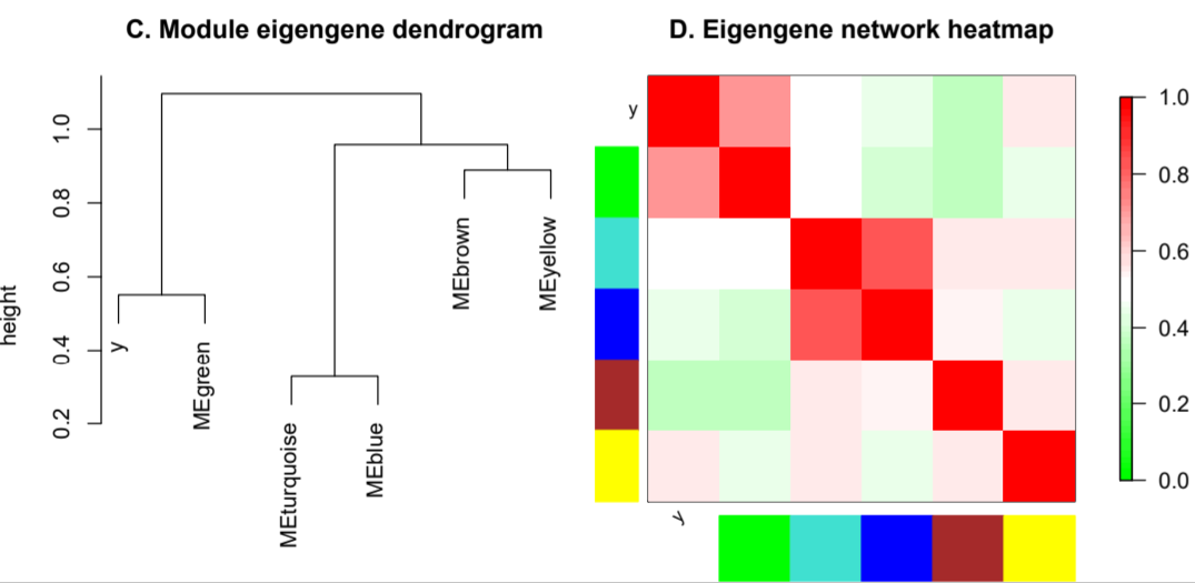 C: иерархическая кластеризация несхожести собственных векторов, D: тепловая карта матрицы смежности, построенной на основании коэффициентов корреляции собственных генов.